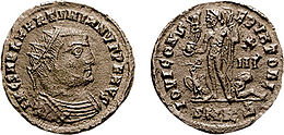 moneta